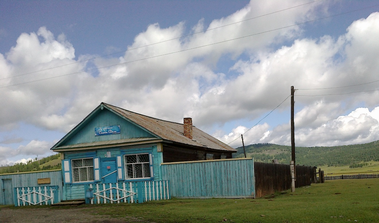 Бортойский магазин